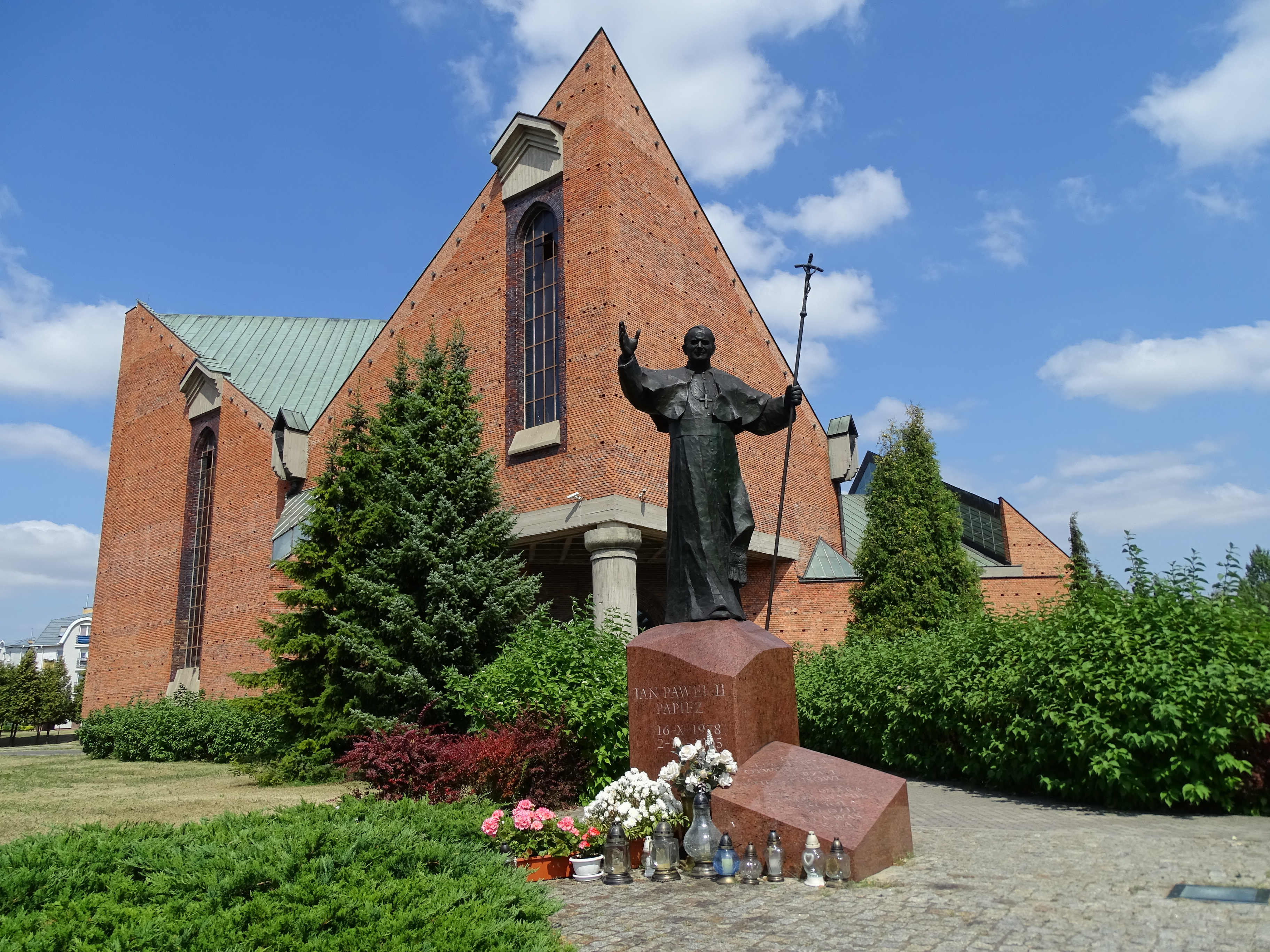 Pomnik Jana Pawła II znajdujący się przy kościele świętego Antoniego Padewskiego w Lesznie